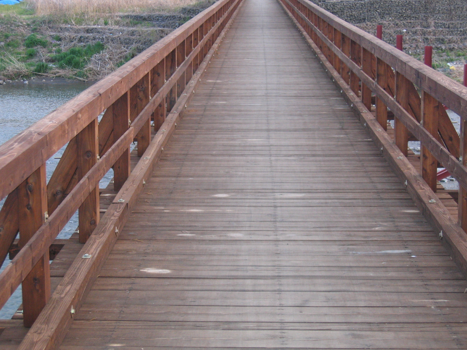 碓氷川の木橋